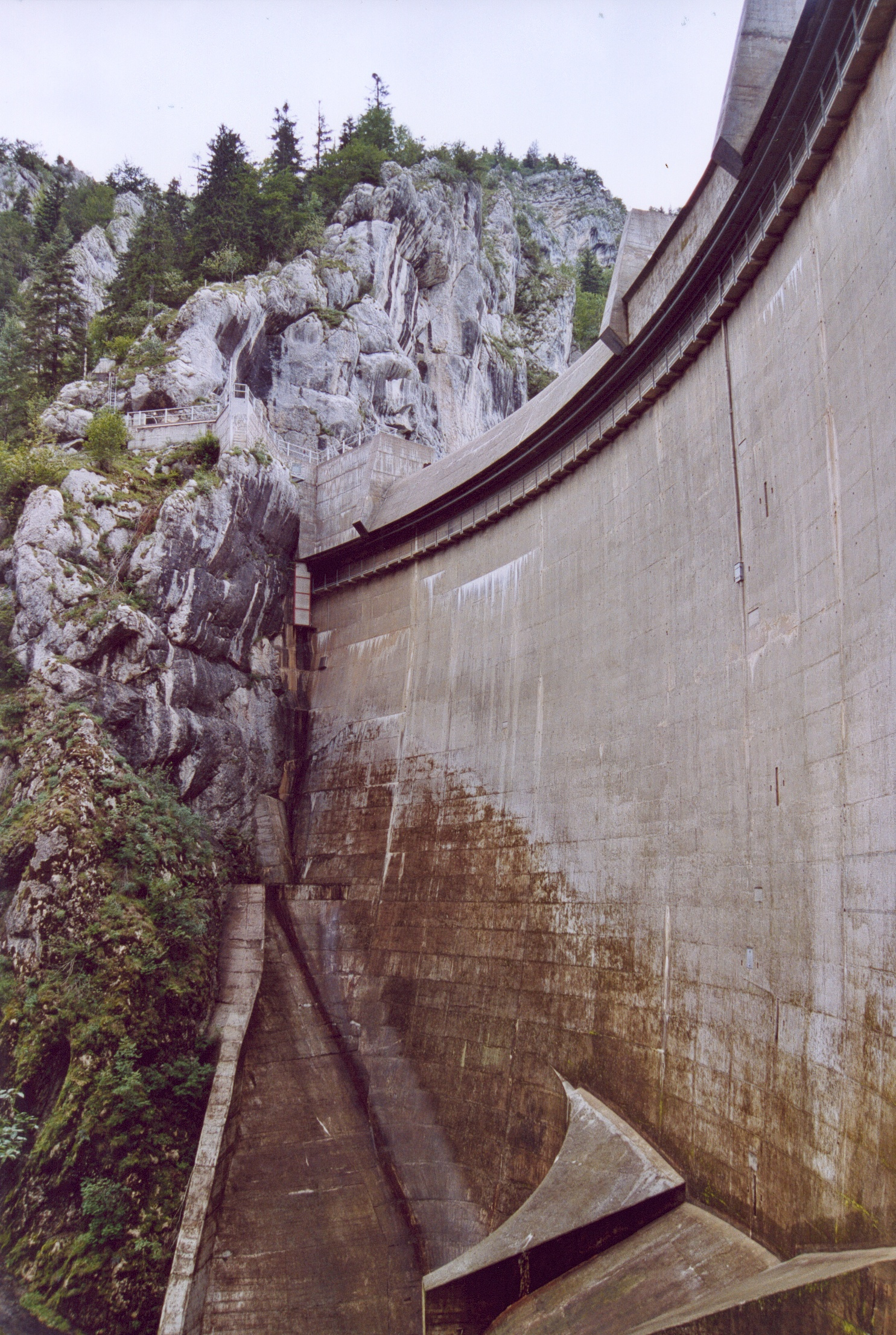 Le Doubs France Photographie prise par Patrick GIRAUD